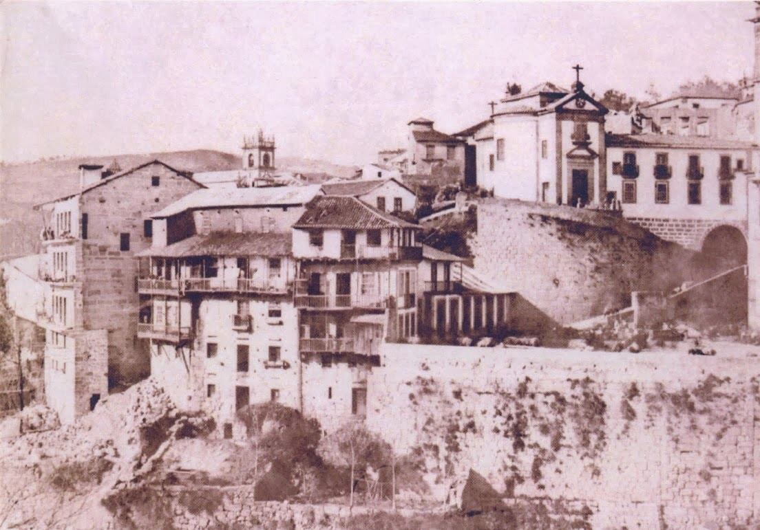 Amarante - Largo_de S. Gonçalo. Frederick_William_Flower c. 1850.